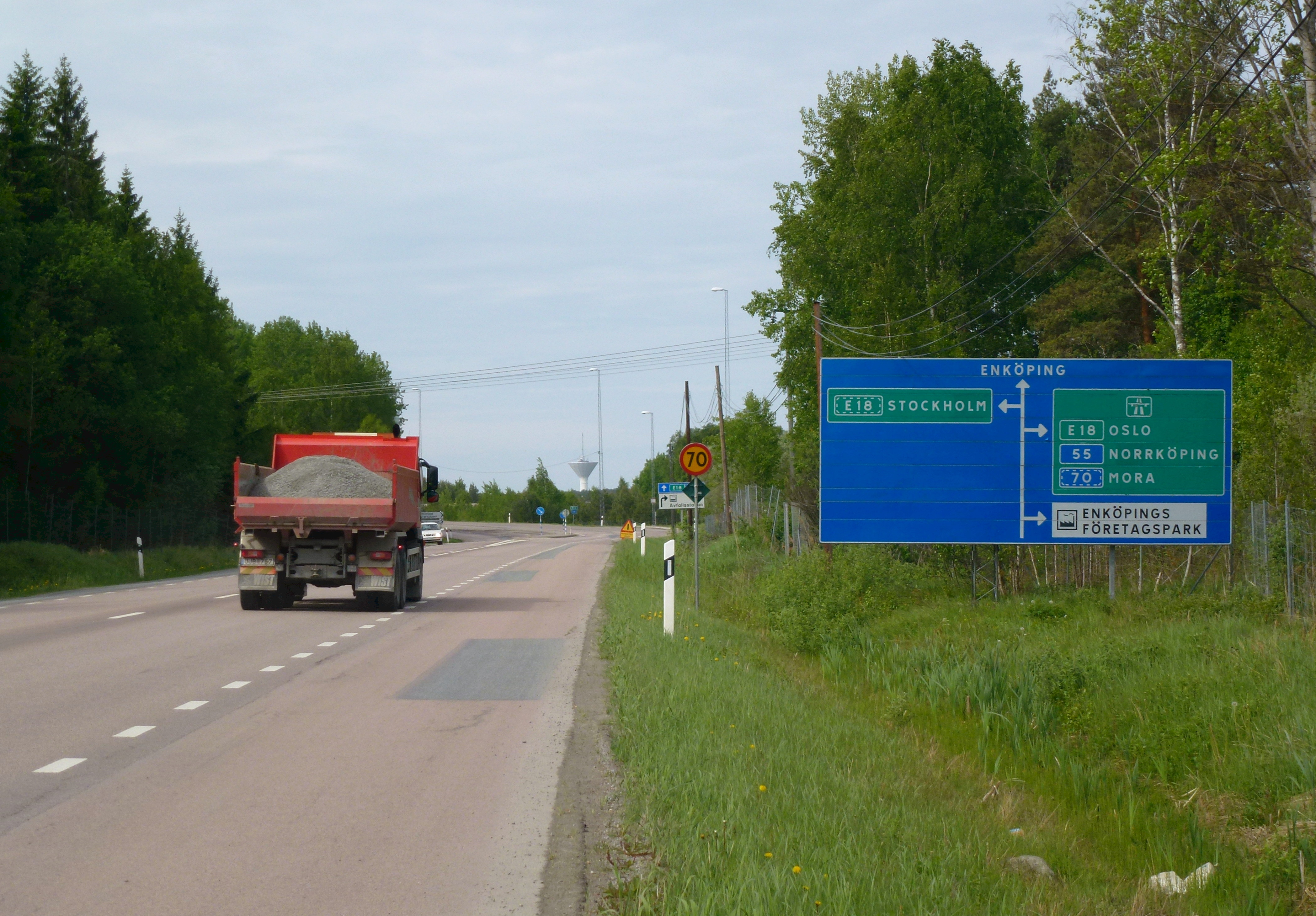 På gamla Enköpingsvägen (Riksväg 55), vy mot korsningen med motorvägen E18 (Trafikplats Annelund)